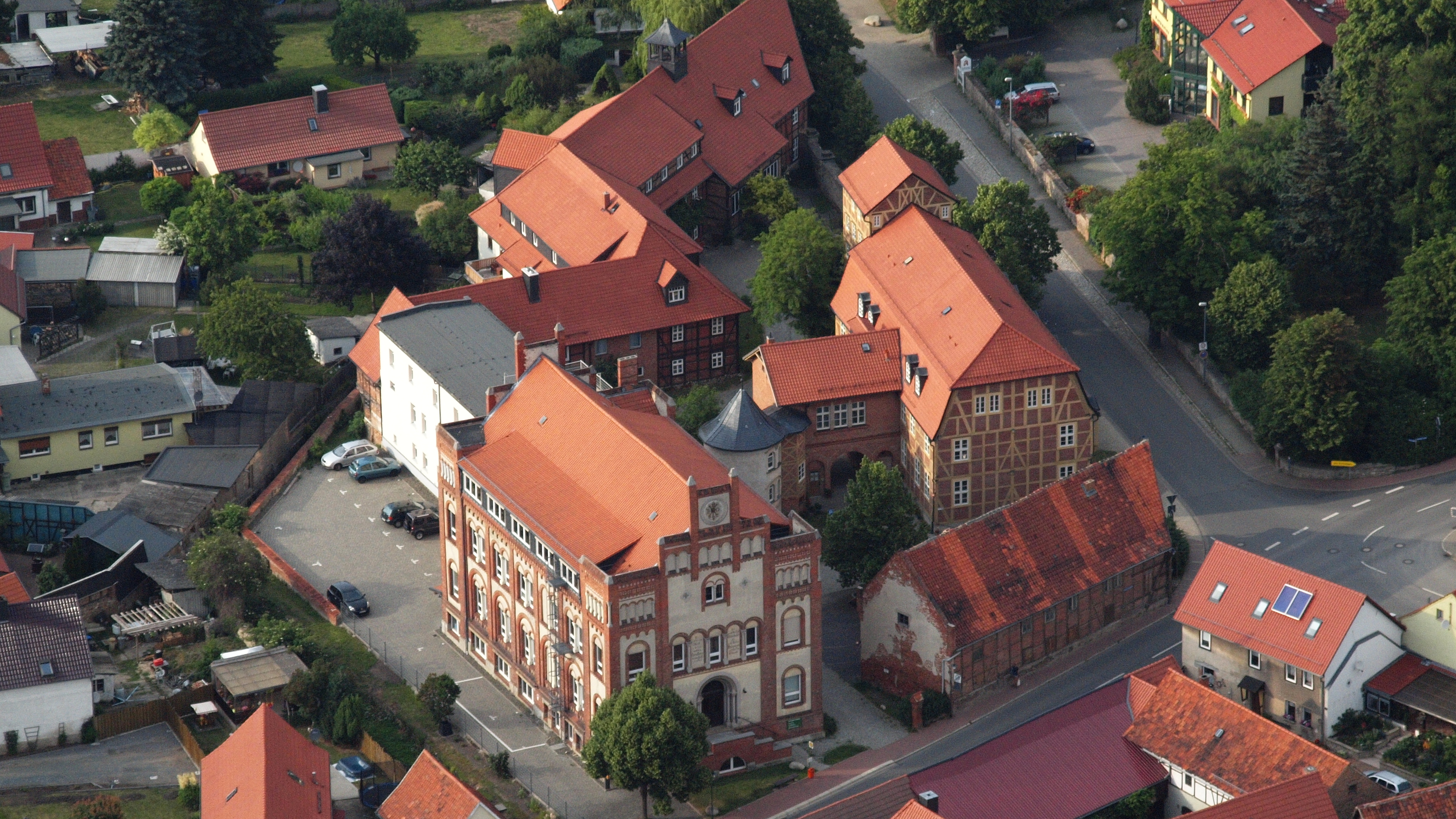 Neinstedt, Bereich Lindenstraße 1-3 mit Hauptverwaltung und Lindenhof, Luftaufnahme (2015)